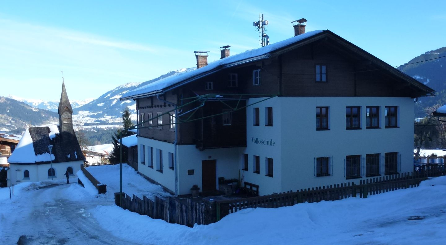 Kirche und Schule in Penningdörfl